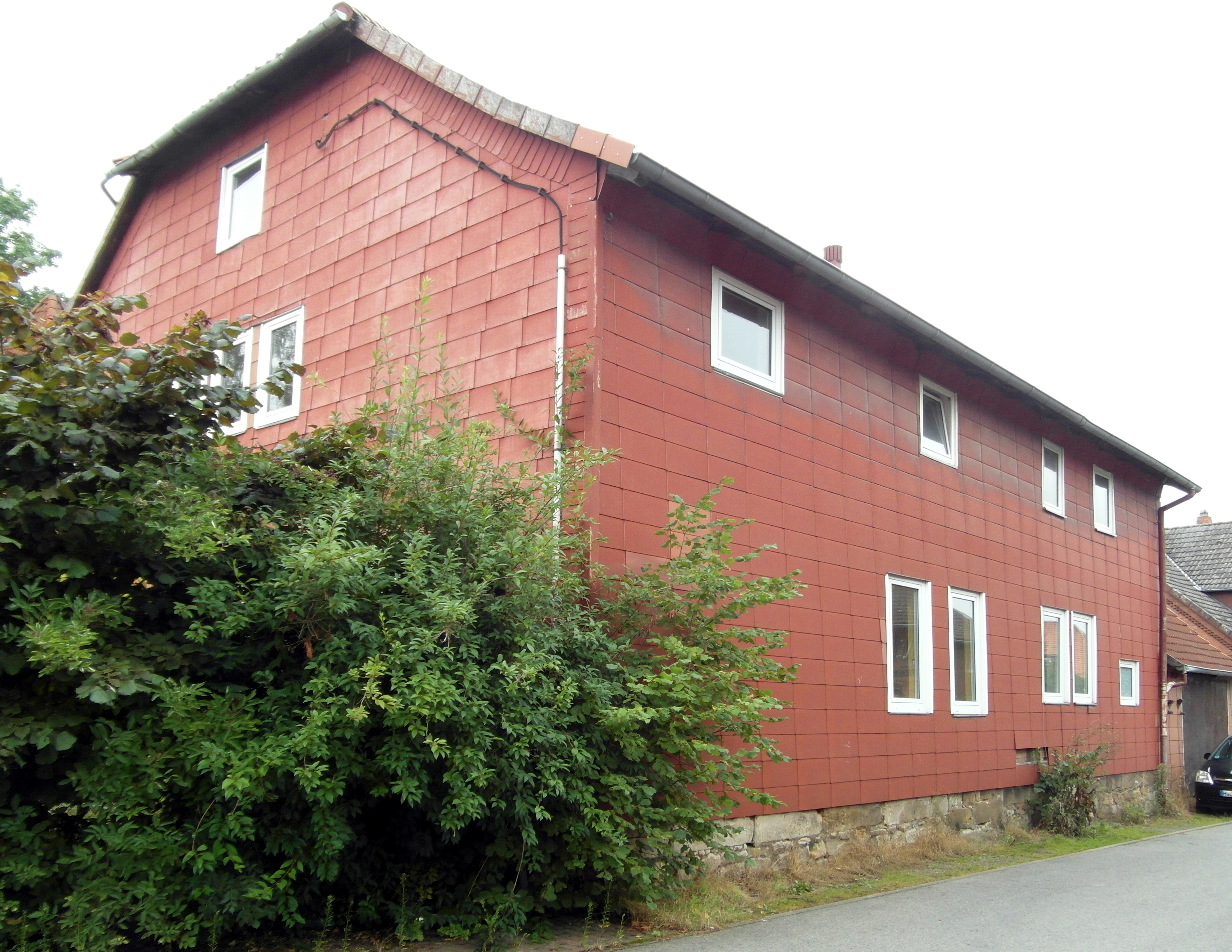 Das Schulhaus wurde ab 1825 für die Dörfer Linderte und Vörie errichtet und von 1912 bis 1919 umgebaut. 1966 wurde die Schule geschlossen. Das Gebäude diente danach als Verwaltungsnebenstelle und wurde 1986 verkauft.